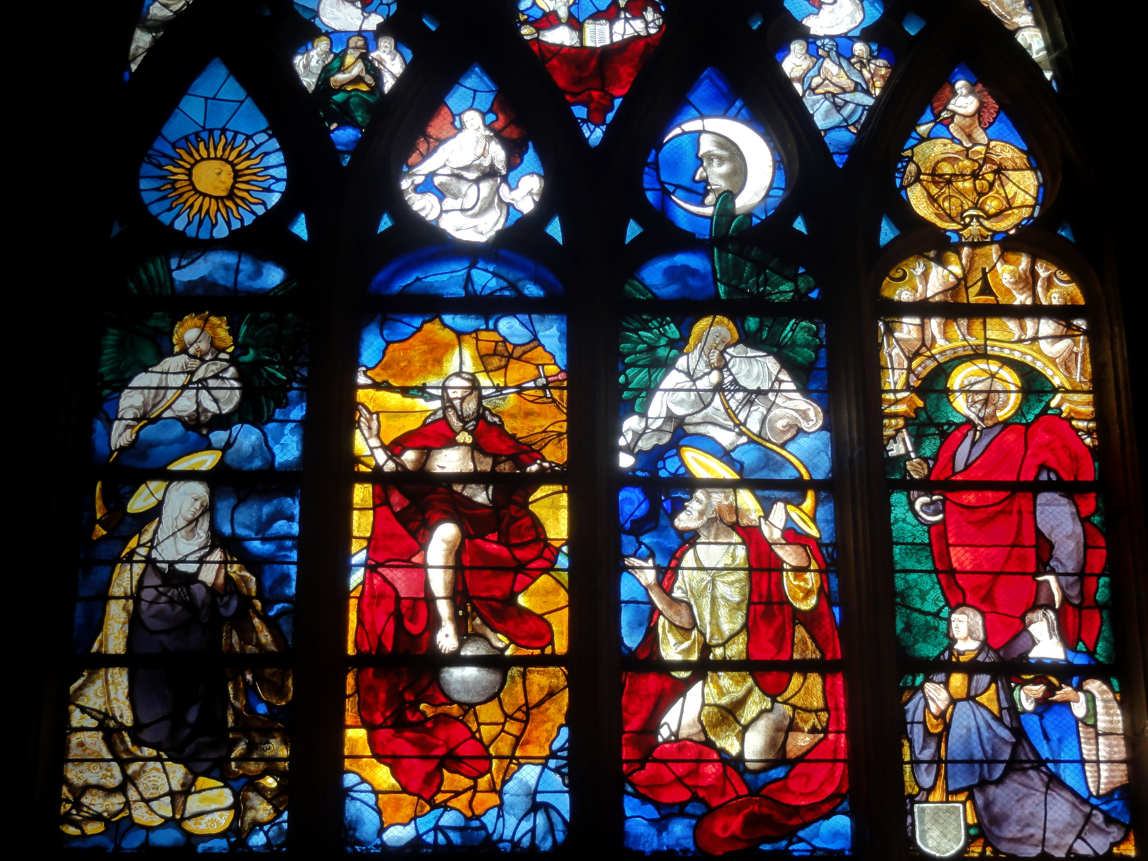 Vitrail de la baie n° 6 au chevet du déambulatoire sud, près de la chapelle Saint-Nicolas : « Le Jugement dernier ».